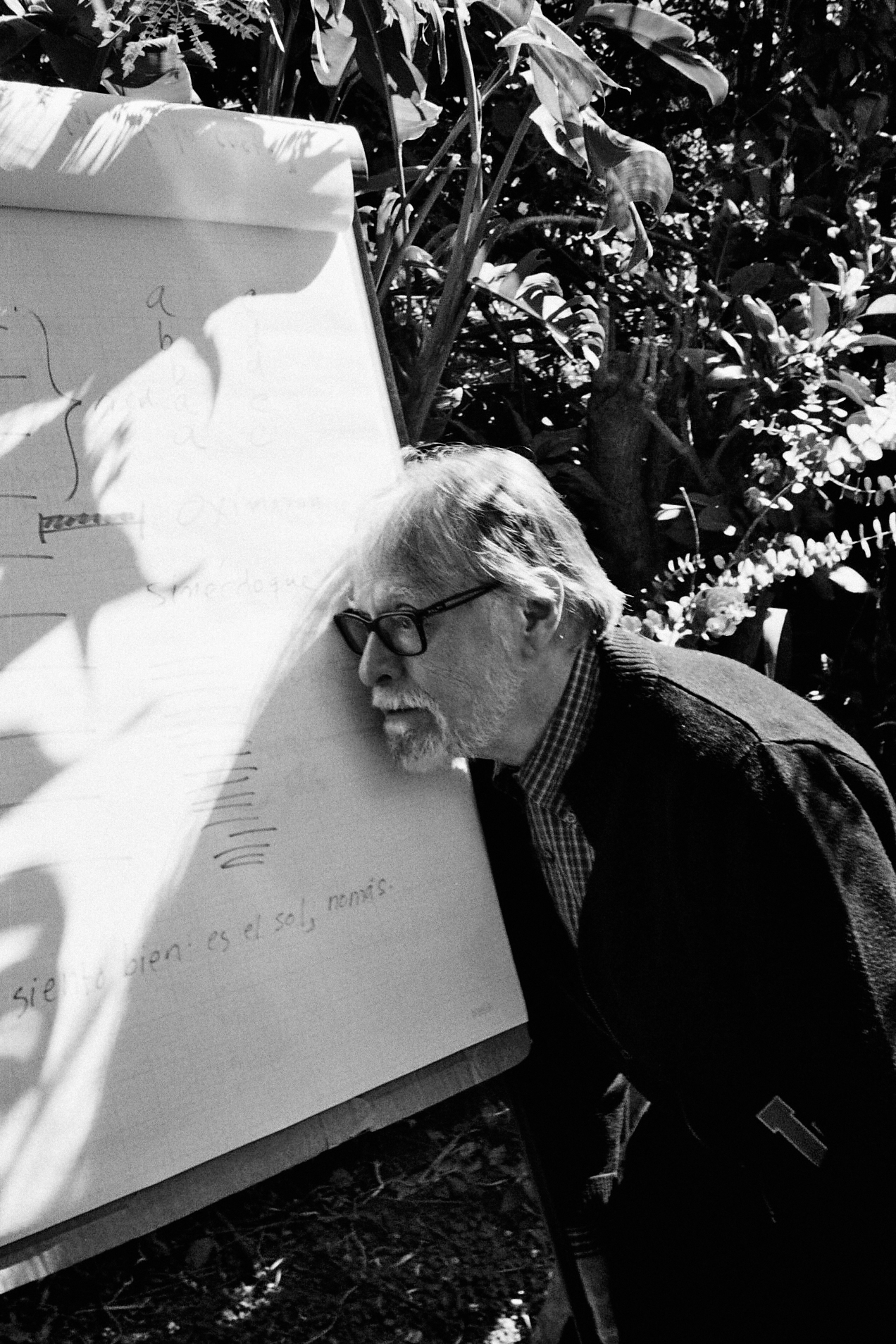 David Huerta en Tepoztlán, 2018. Fotografía por Alejandro Arras